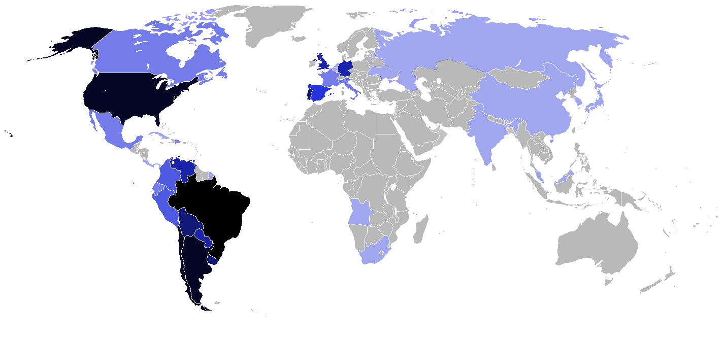 Mapa mostrando os países que Fernando Henrique Cardoso visitou durante seus oito anos de Presidente do Brasil. Legenda: Brasil 7 ou mais visitas 6 visitas 5 visitas 4 visitas 3 visitas 2 visitas 1 visita